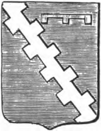 Riproduzione in bianco e nero dello stemma della famiglia Della Marra (o Marra) D'azzurro alla banda doppio merlata d'argento, ossia scala militare, accompagnata nel capo dal rastello a tre pendenti di rosso.